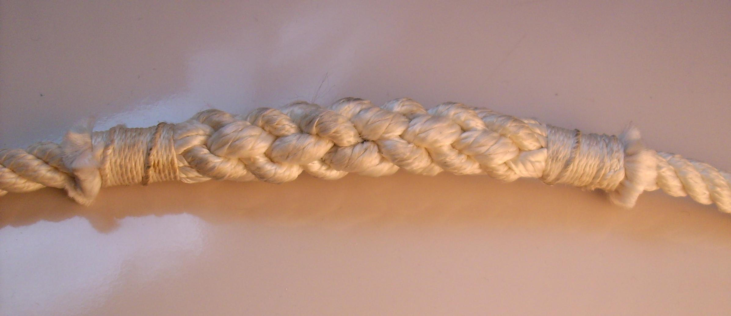 Kurzspleiß mit Taklingen gesichert